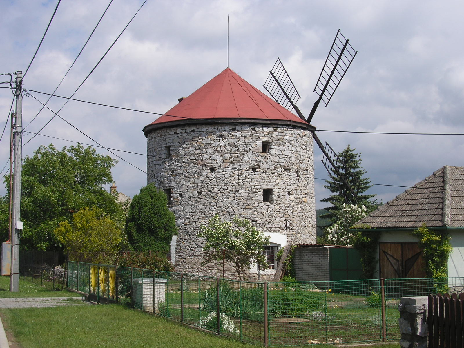 Větrný mlýn v Ostrově u Macochy